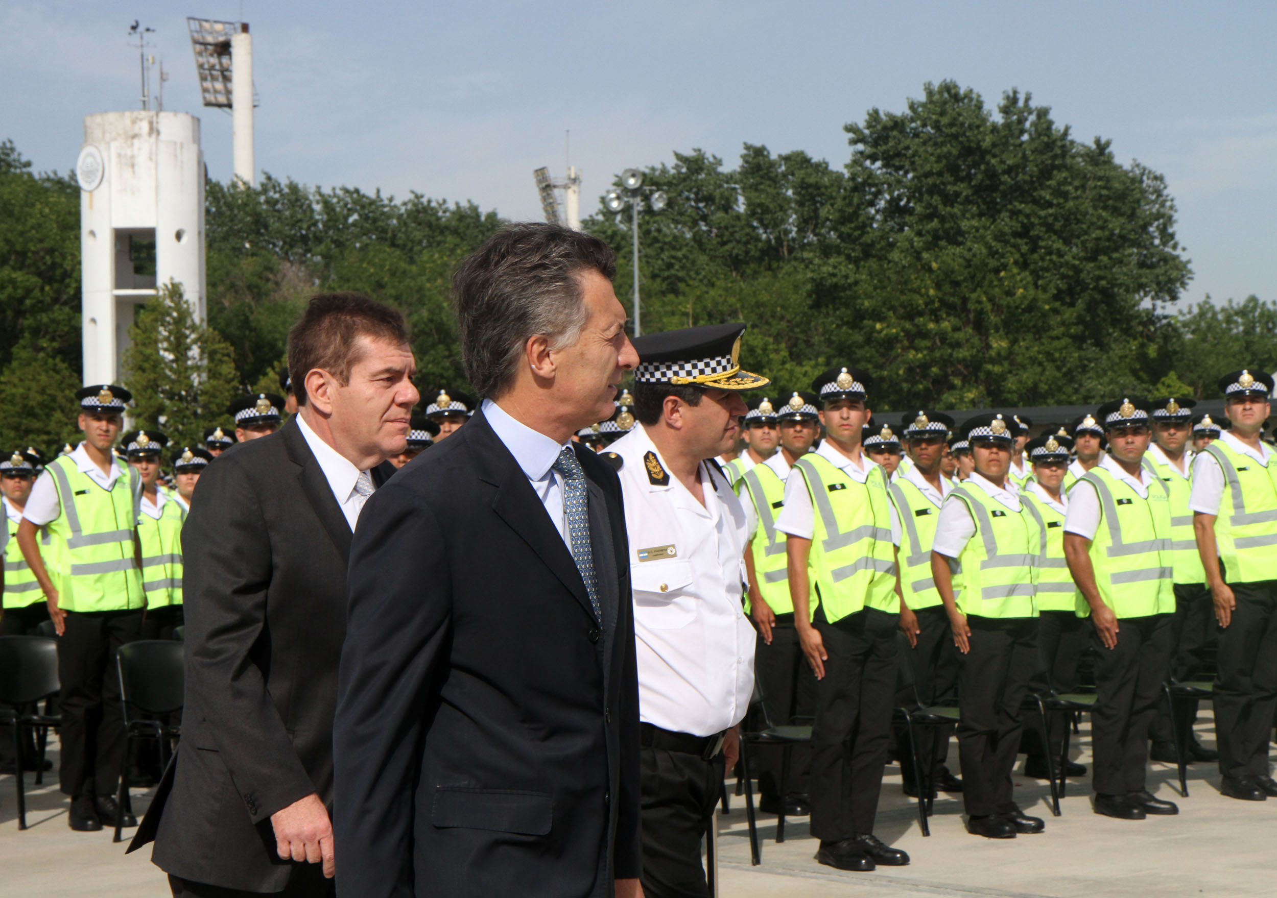 Buenos Aires. Diciembre 14 de2012. El jefe de Gobierno de la Ciudad de Buenos Aires, Mauricio Macri, encabezó esta mañana la ceremonia de egreso de los cadetes y los nuevos oficiales que se incorporan a la Policía Metropolitana. Foto Sandra Hernandez-gv/GCABA.